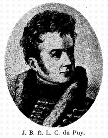 Komponisten Jean Baptiste Édouard Du Puy. Kilde: Salmonsens leksikon, 1917. Rettighedshaver: alle rettigheder udløbet